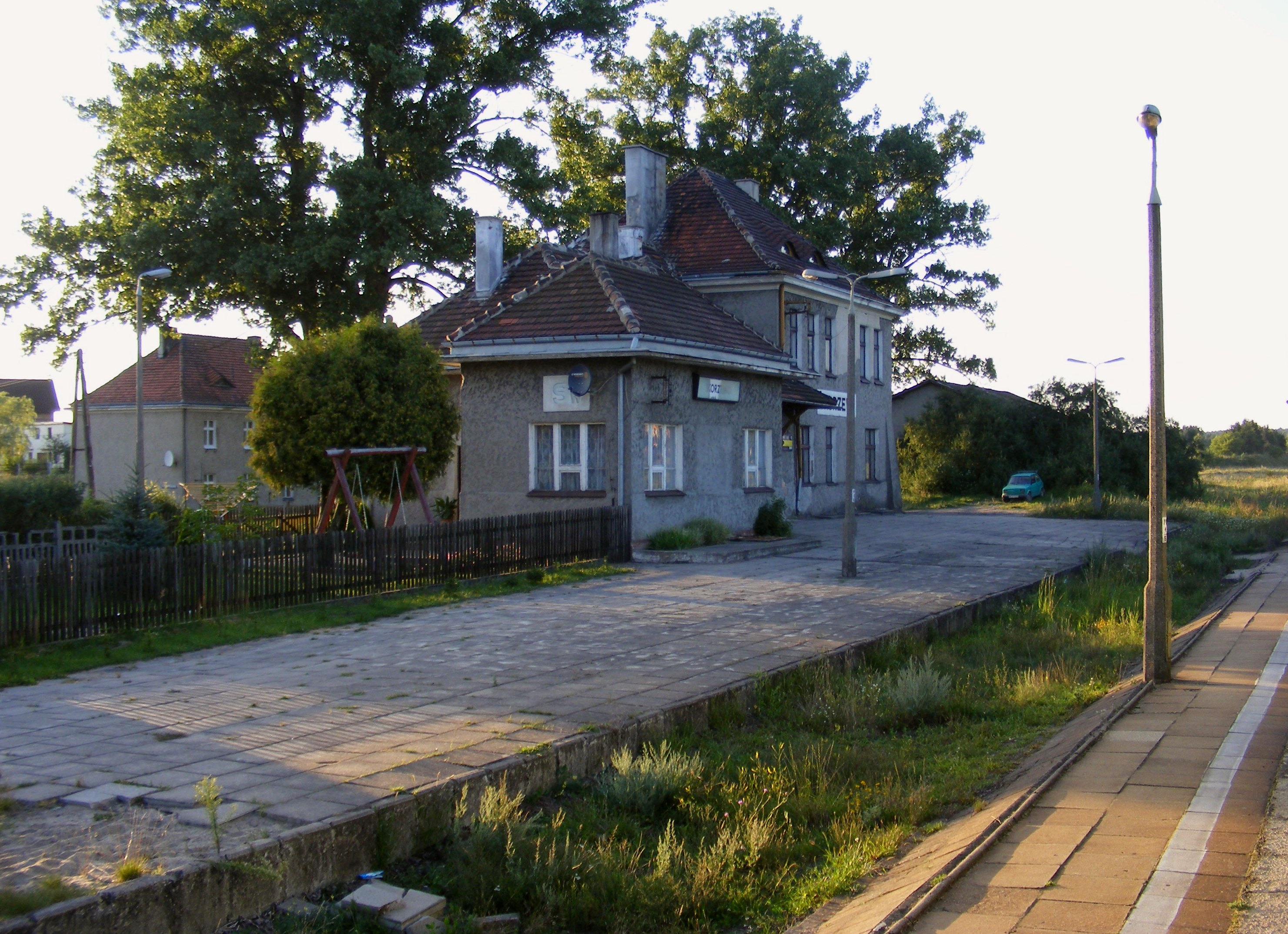 Przystanek kolejowy Skorzewo (woj. pomorskie)